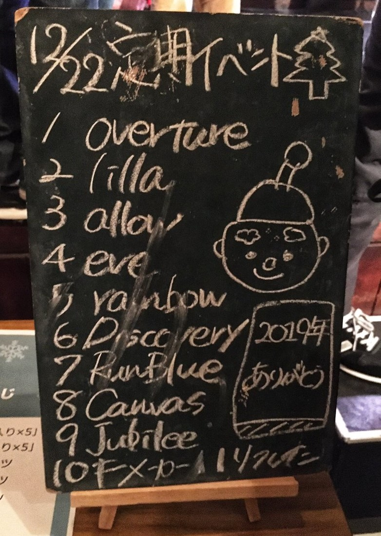 amiinAセトリボード